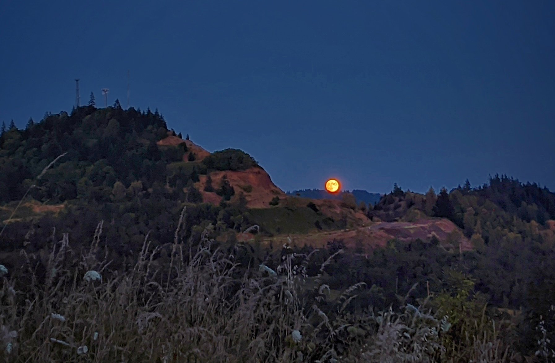 Springfield, Oregon